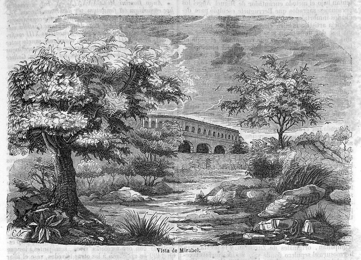 España pintoresca. Vista de Mirabel.